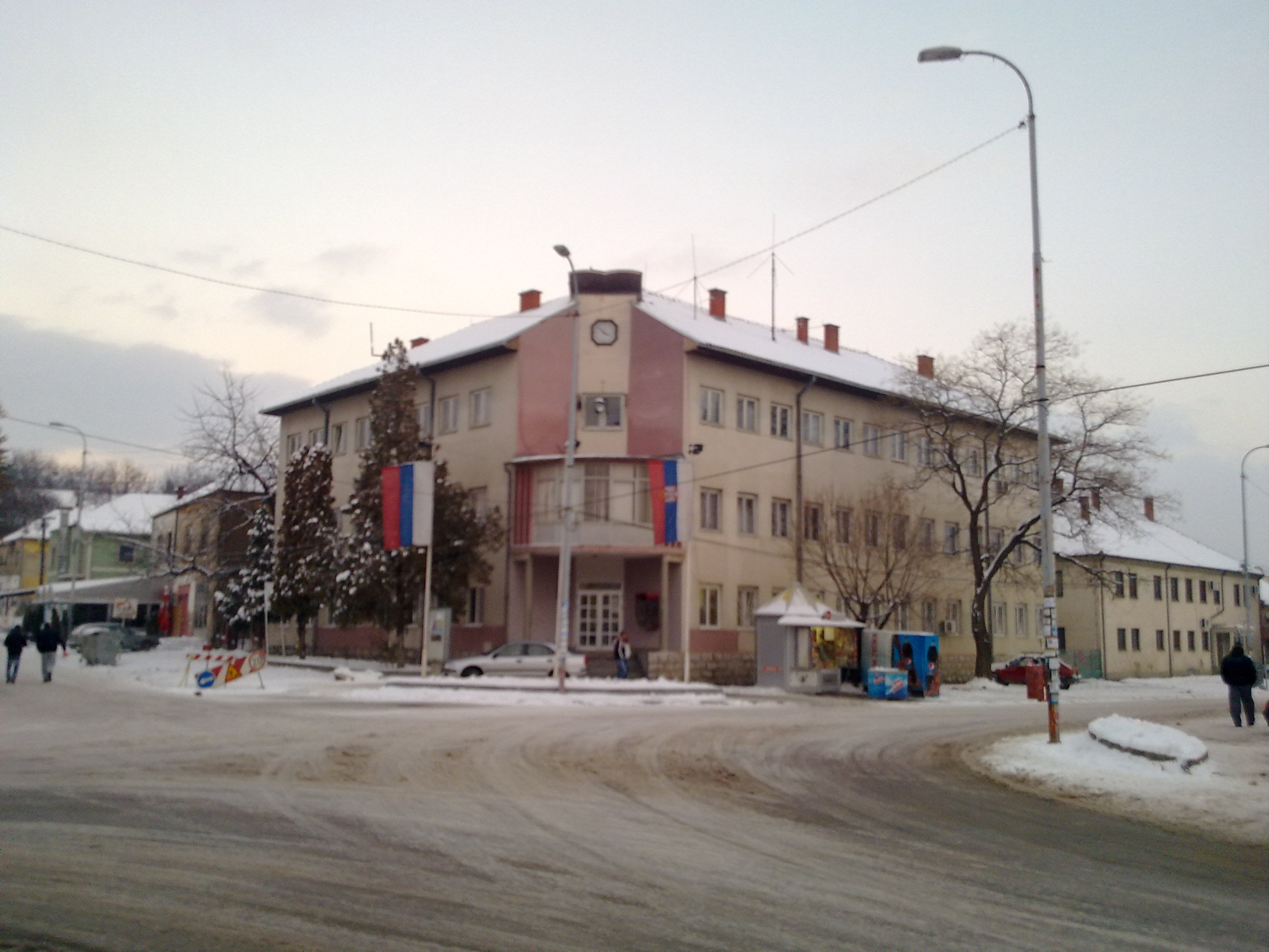 Зграда општине Бабушница, децембар 2012.